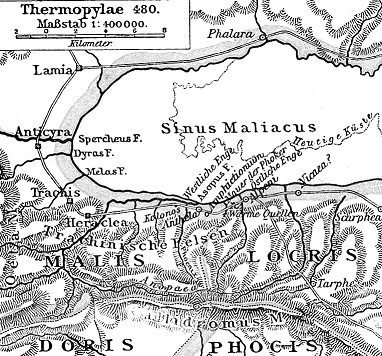 Thermopylen